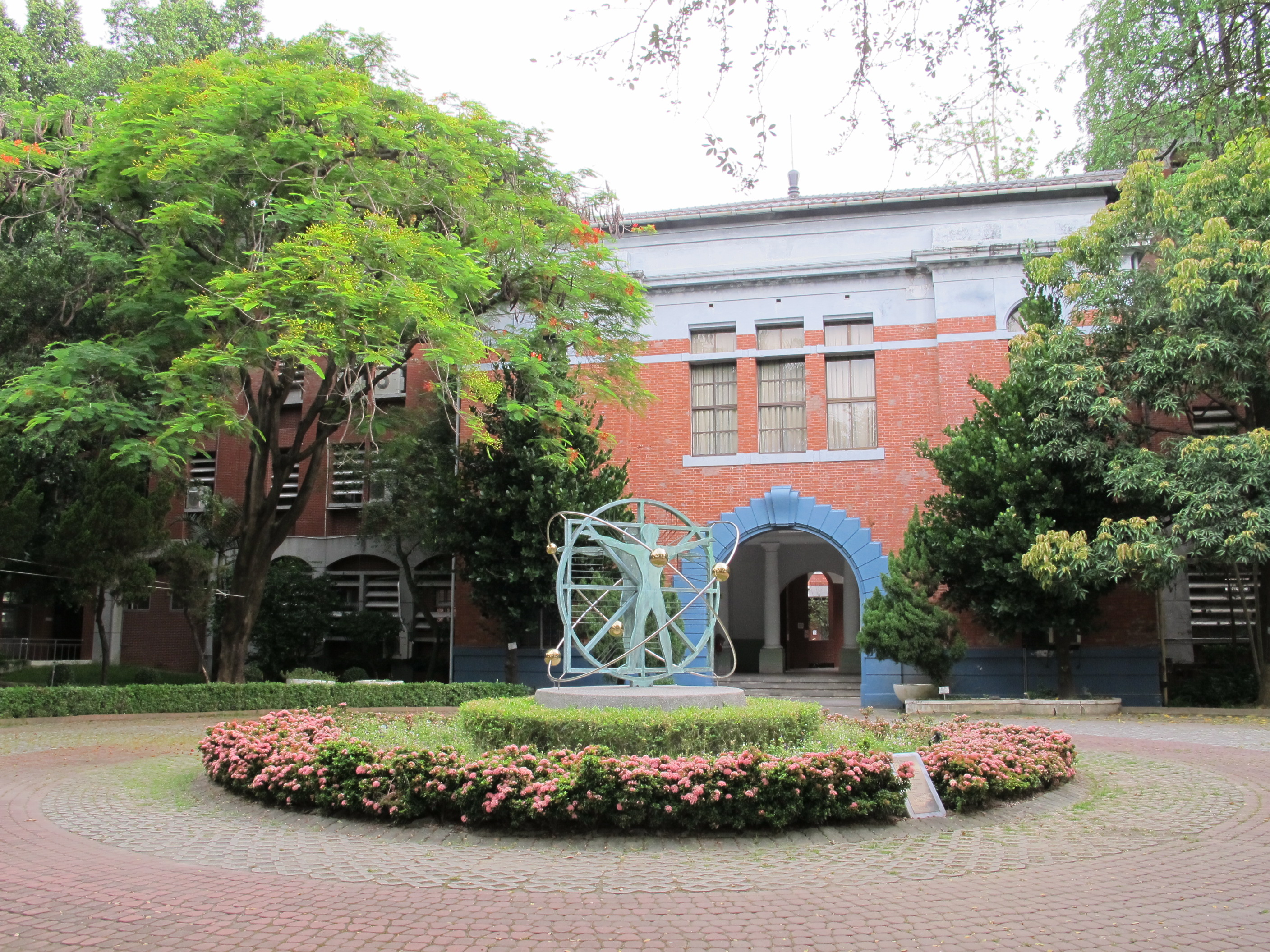 臺南二中小圓環與弘道樓